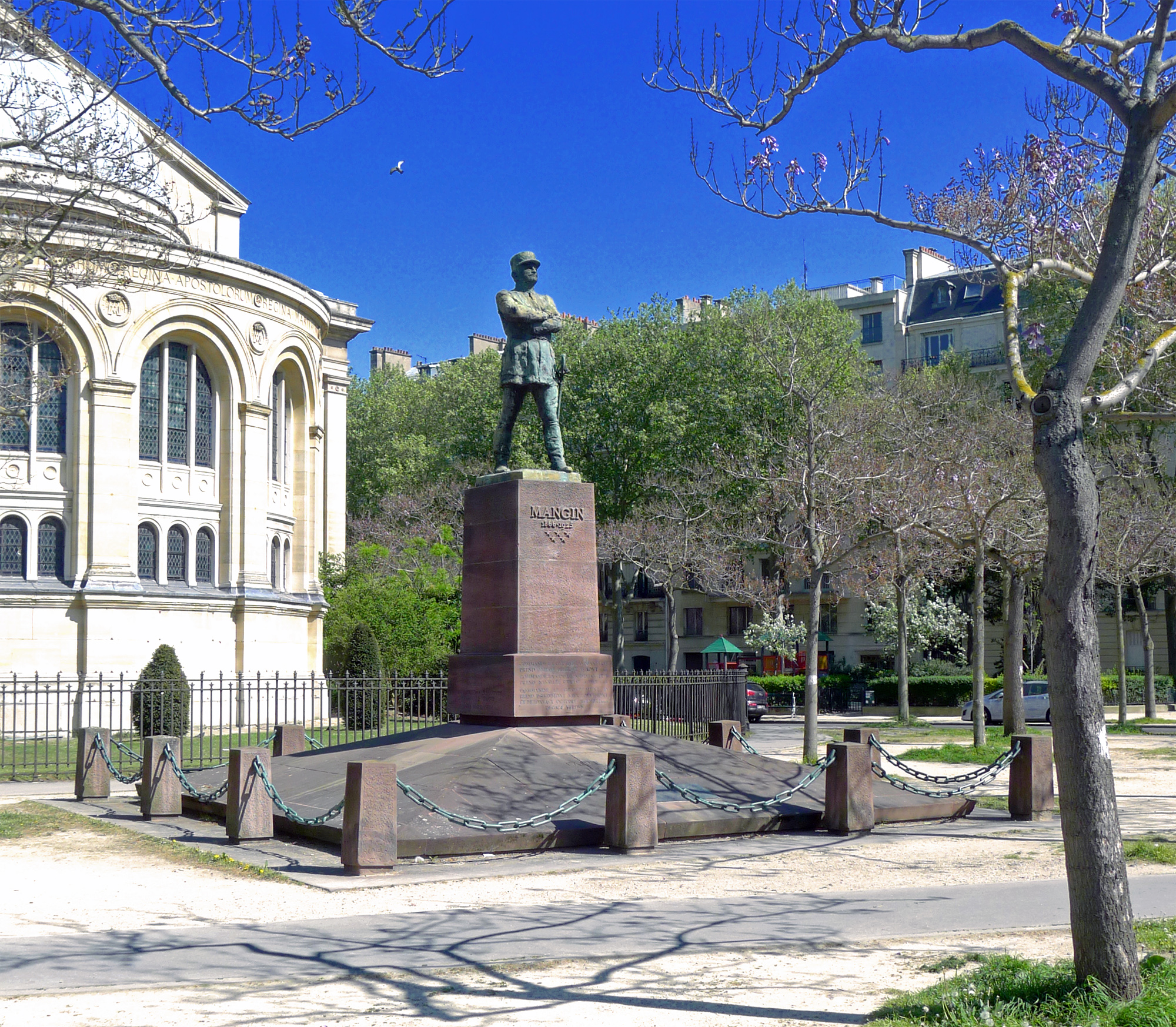 Place du Président-Mithouard (statue de Mangin) - Paris VII